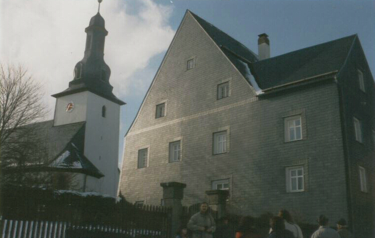 Schloss und Kirche von Bernstein, heute Ortsteil von Wunsiedel